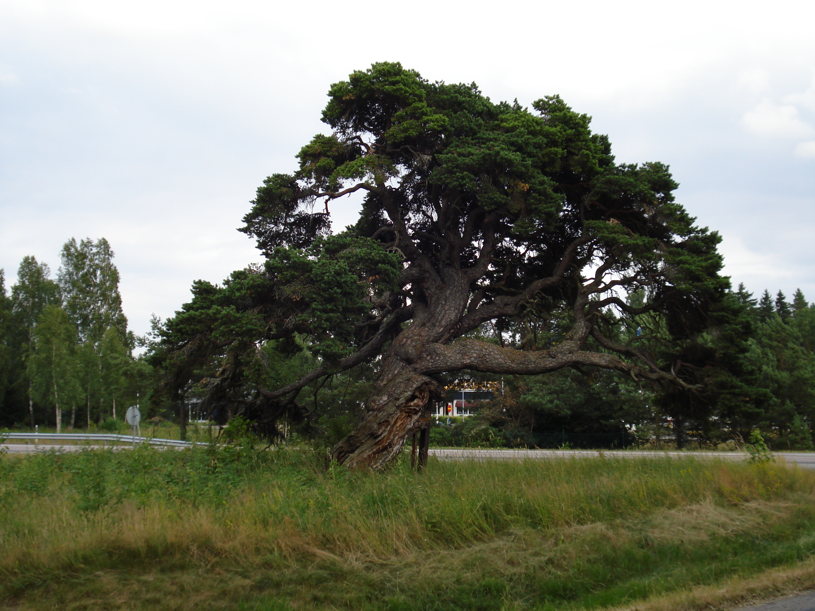 Naturminnet Fårtallen i Götlunda, Arboga kommun. Tallen bedöms vara mellan 400 och 450 år gammal.